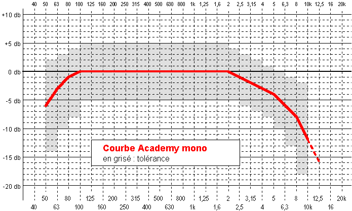 Courbe Academy Ænglisc: Academy Curve